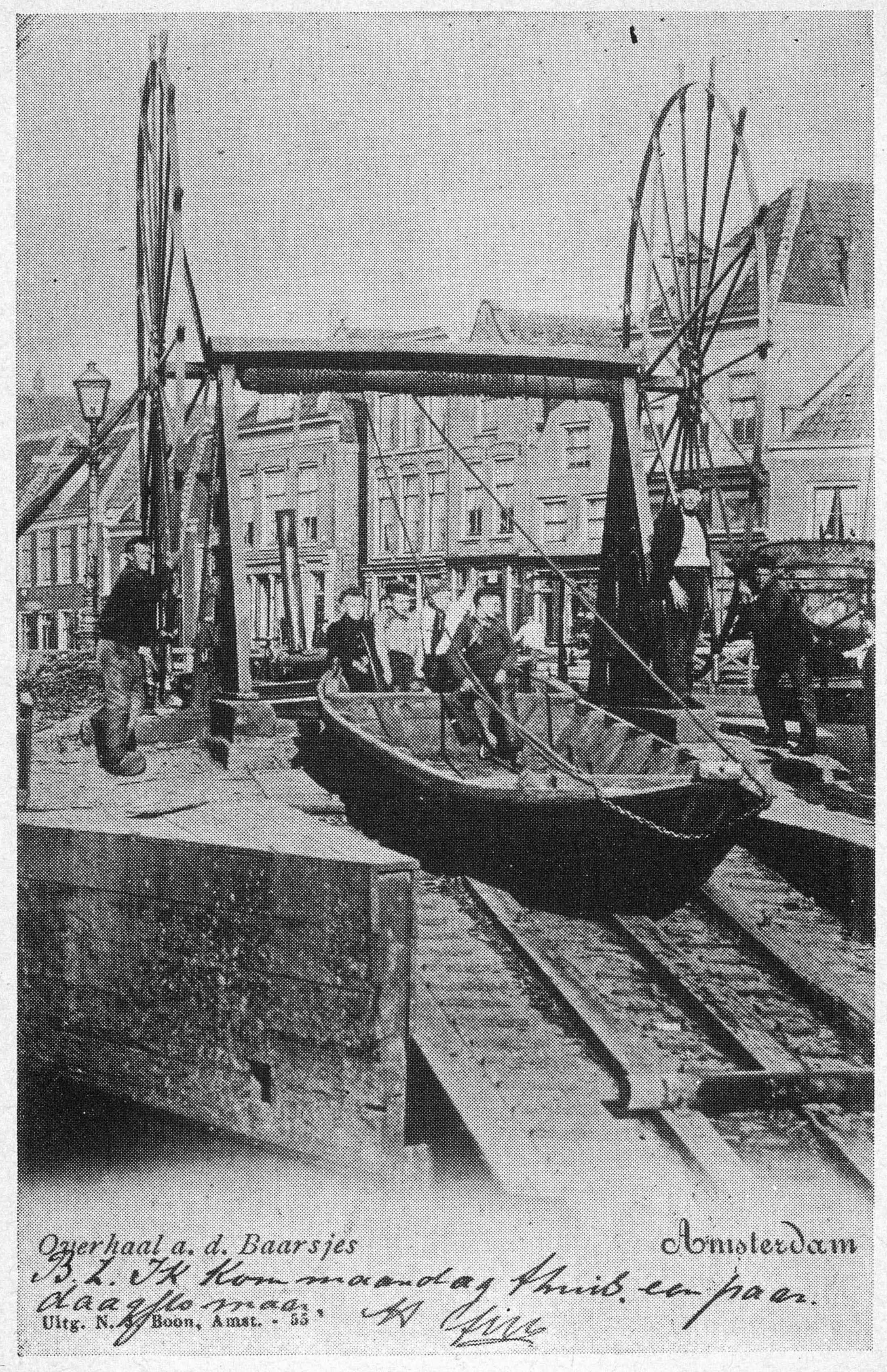 Photographed in Amsterdam between 1900 and 1914.